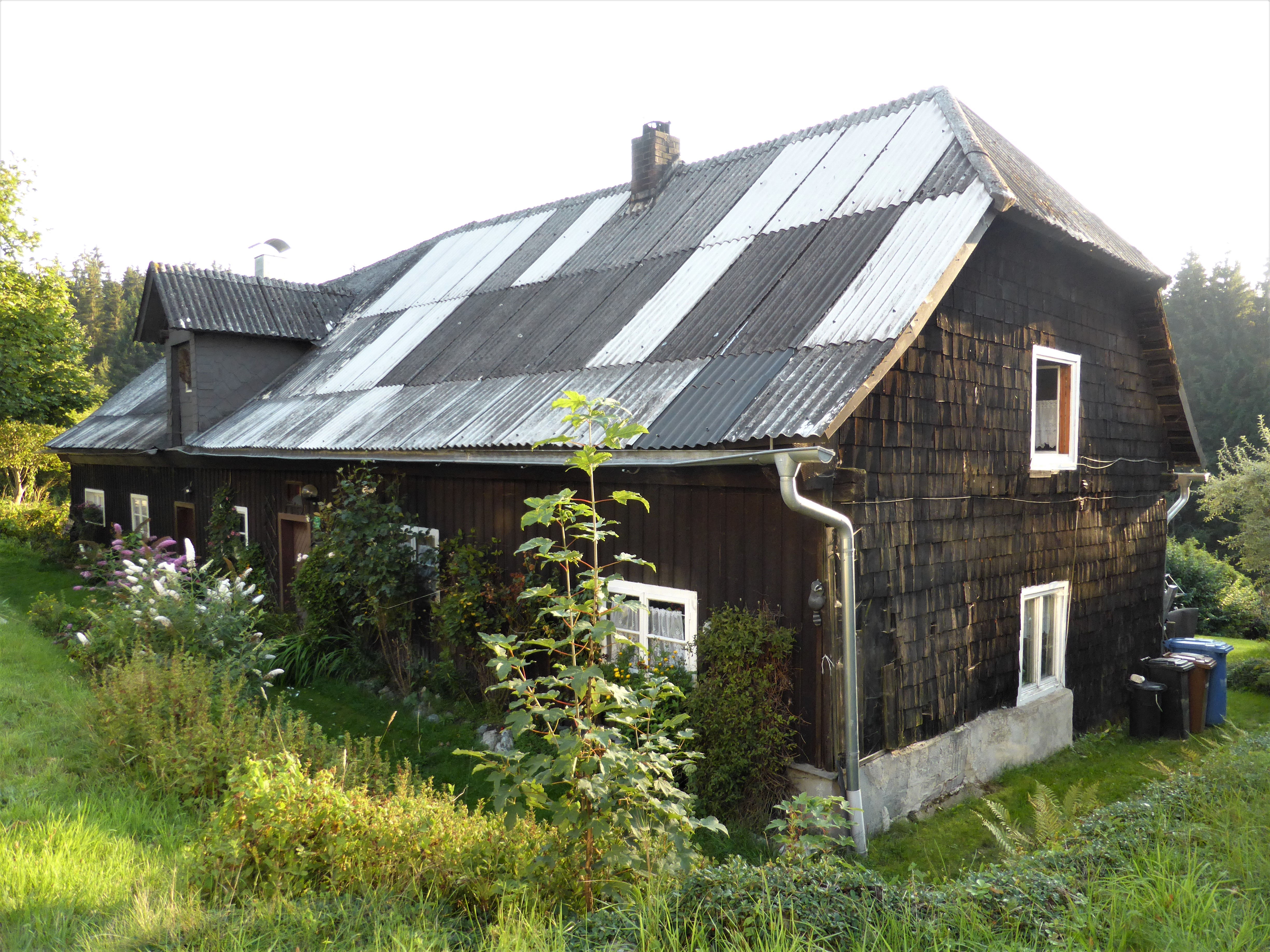 Ehemaliges Pottasche-Sudhaus in Zwiesler Waldhaus 7, Lindberg.This is a photograph of an architectural monument.